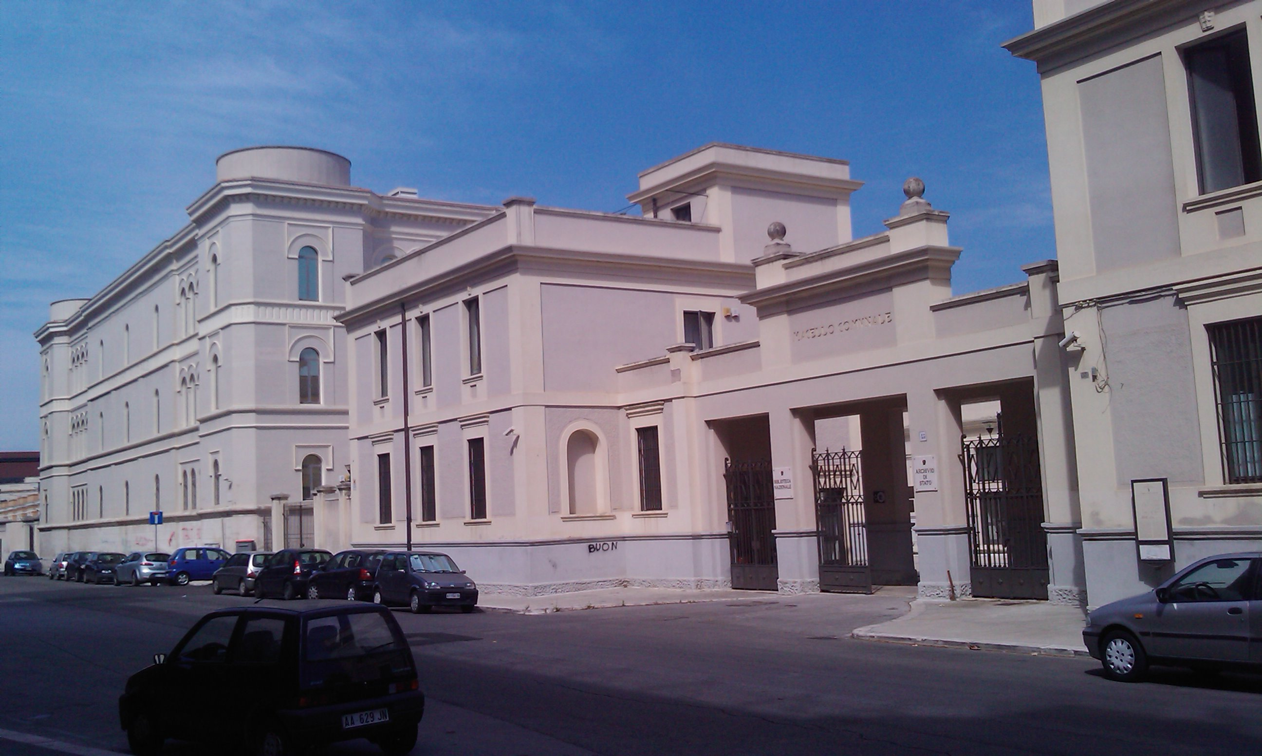 Facciata della Biblioteca Nazionale Sagarriga Visconti-Volpi di Bari